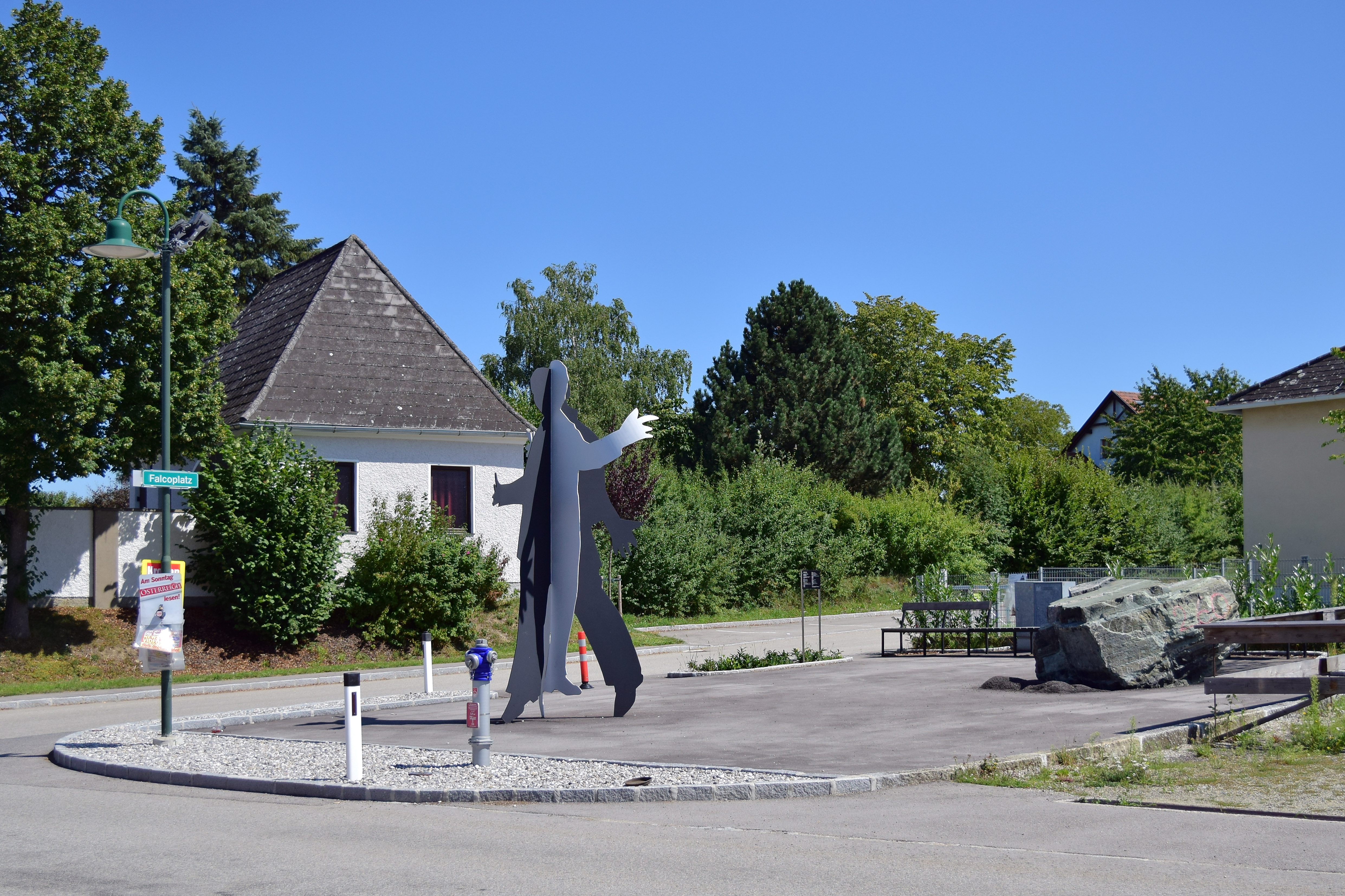 Das Falco-Denkmal in Gansbach, dem Ort seiner Familie väterlicherseits, besteht aus einer vier Meter hohen Falco-Silhouette aus Stahl, einem Serpentinit aus dem Dunkelsteinerwald in der Rolle eines Kometen und einem Scheinwerfer, der die Szene abends in buntes Licht hüllt. Der Boden unter dem Serpentinit ist „aufgerissen“, was die Wucht des Aufpralls des Kometen verdeutlicht. Den Titel Kommt der Komet oder kommt er zu spät? hat Katrin Plavčak dem Falco-Lied Nur mit Dir entnommen.